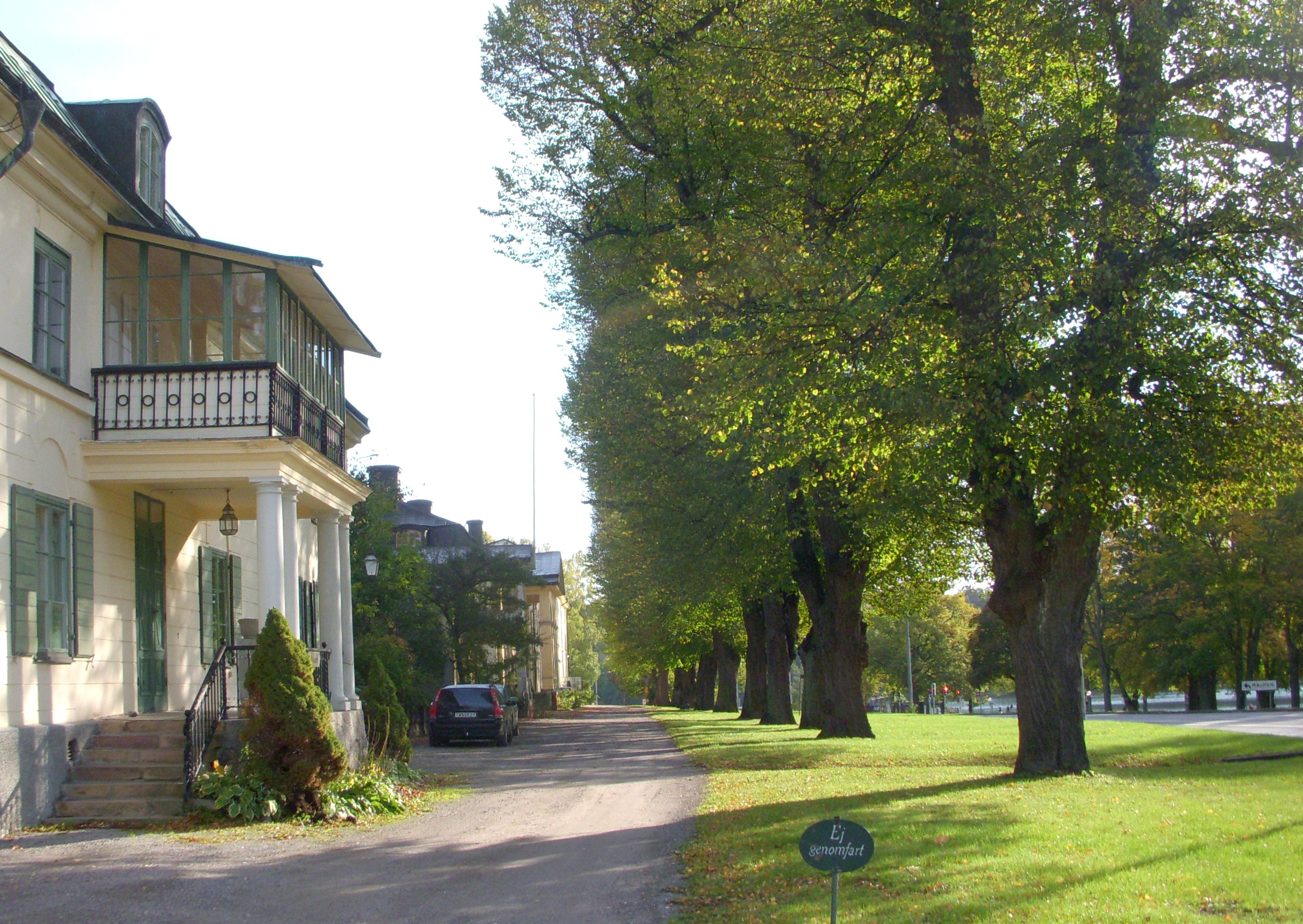 Drottningholmsmalmen, Långa raden mot öst, fastigheten Minerva lägst till vänster.